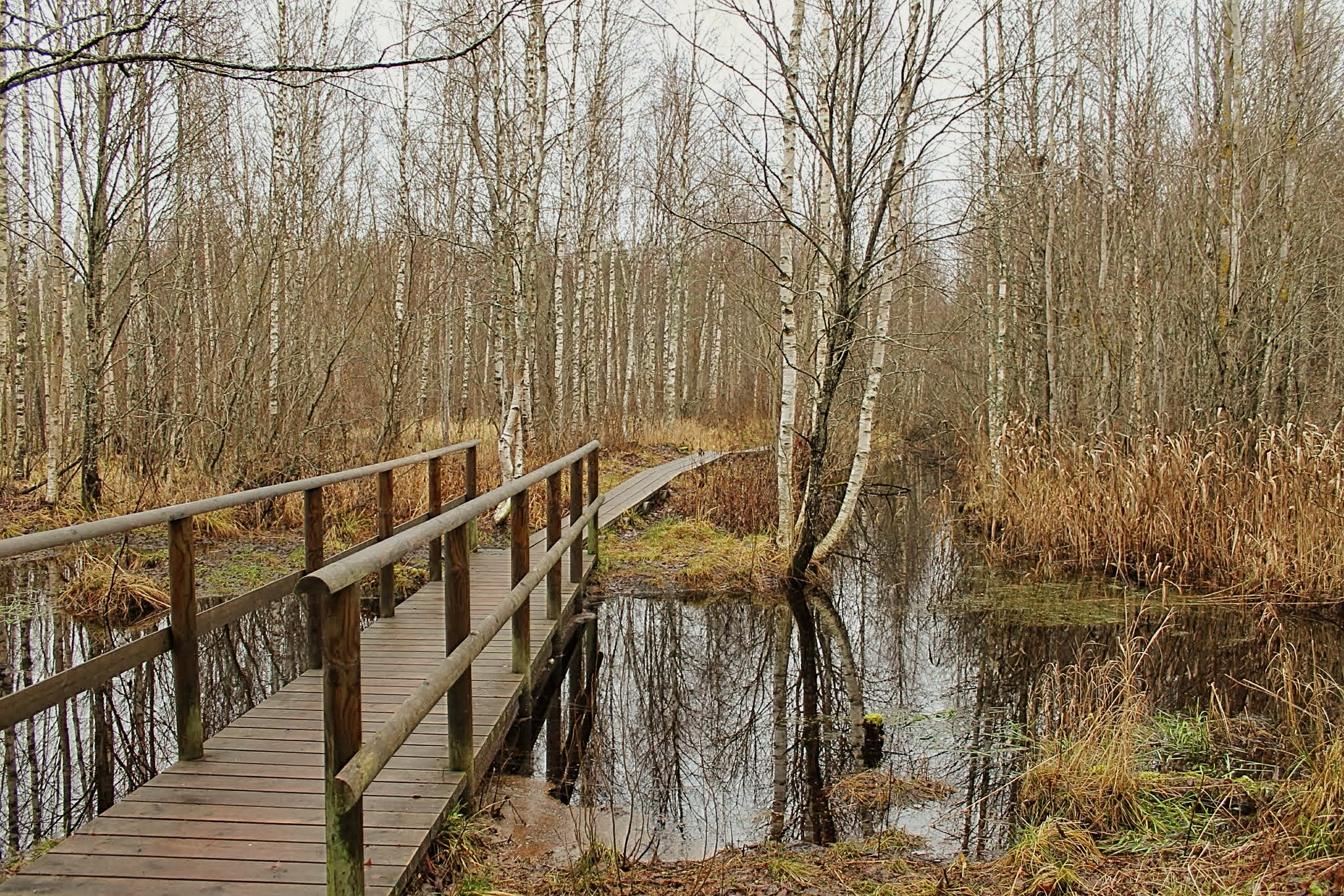 Harjumaa, Pääsküla raba.4 km pikkune rada kulgeb mööda pinnase- ja lauradu läbi erinevate metsatüüpide, üle kanalite ja allikate. Rada on kuiva jalaga läbitav igal aastaajal. Mõlemale raja osale on paigaldatud raba loodust tutvustavad infostendid.